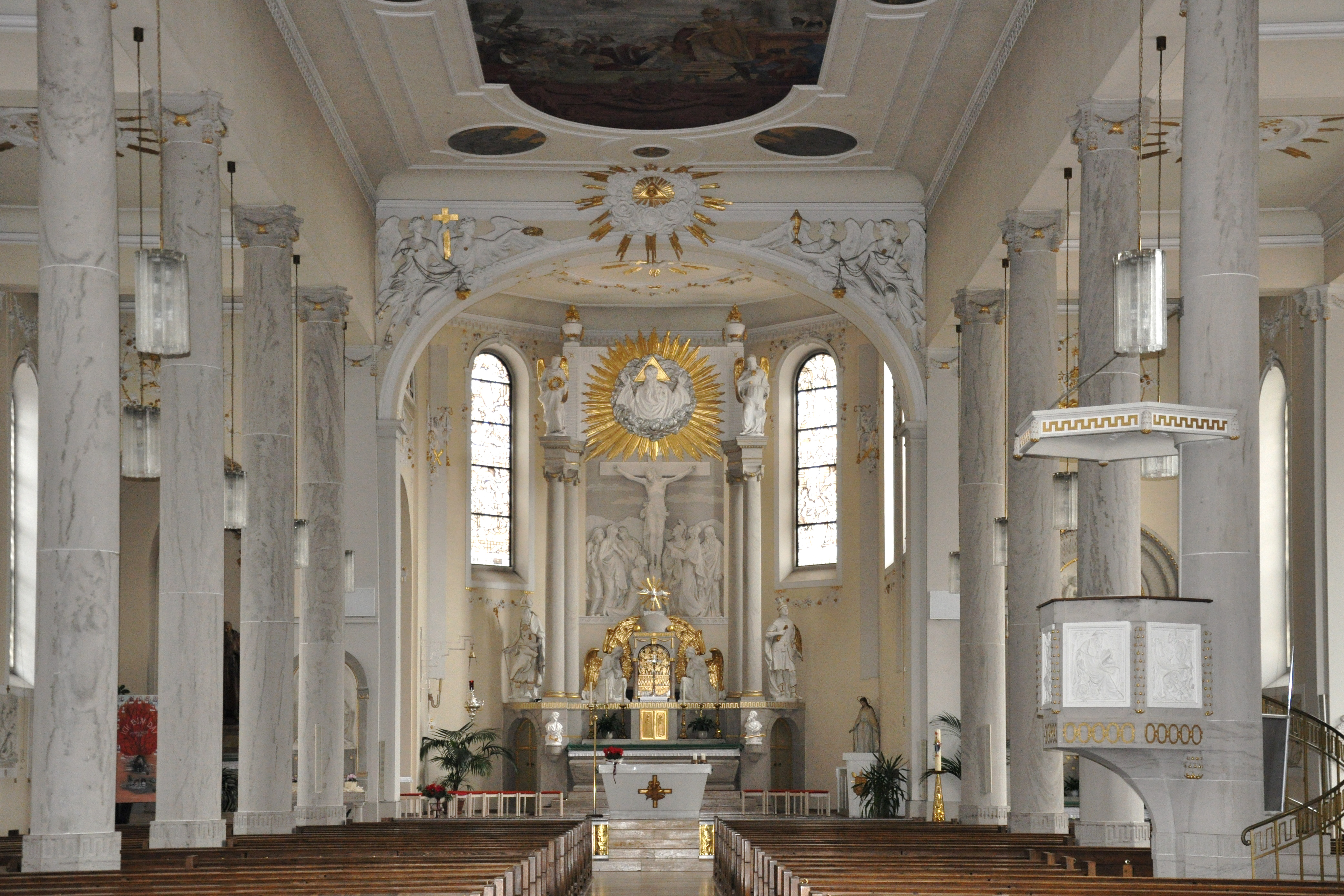 Haslach im Kinzigtal, katholische Pfarrkirche St. Arbogast, mit Hochaltar und Kanzel von August Schädler (1862–1925), 1907